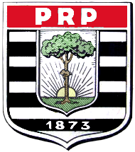 Logo do Partido Republicano Paulista, em um cartaz na época da Revolução Constitucionalista de 1932. É a única imagem desse logotipo publicada em papel, sendo sua outra referência, um pin da mesma época que não está sobre licença livre, que se encontra nessa página.